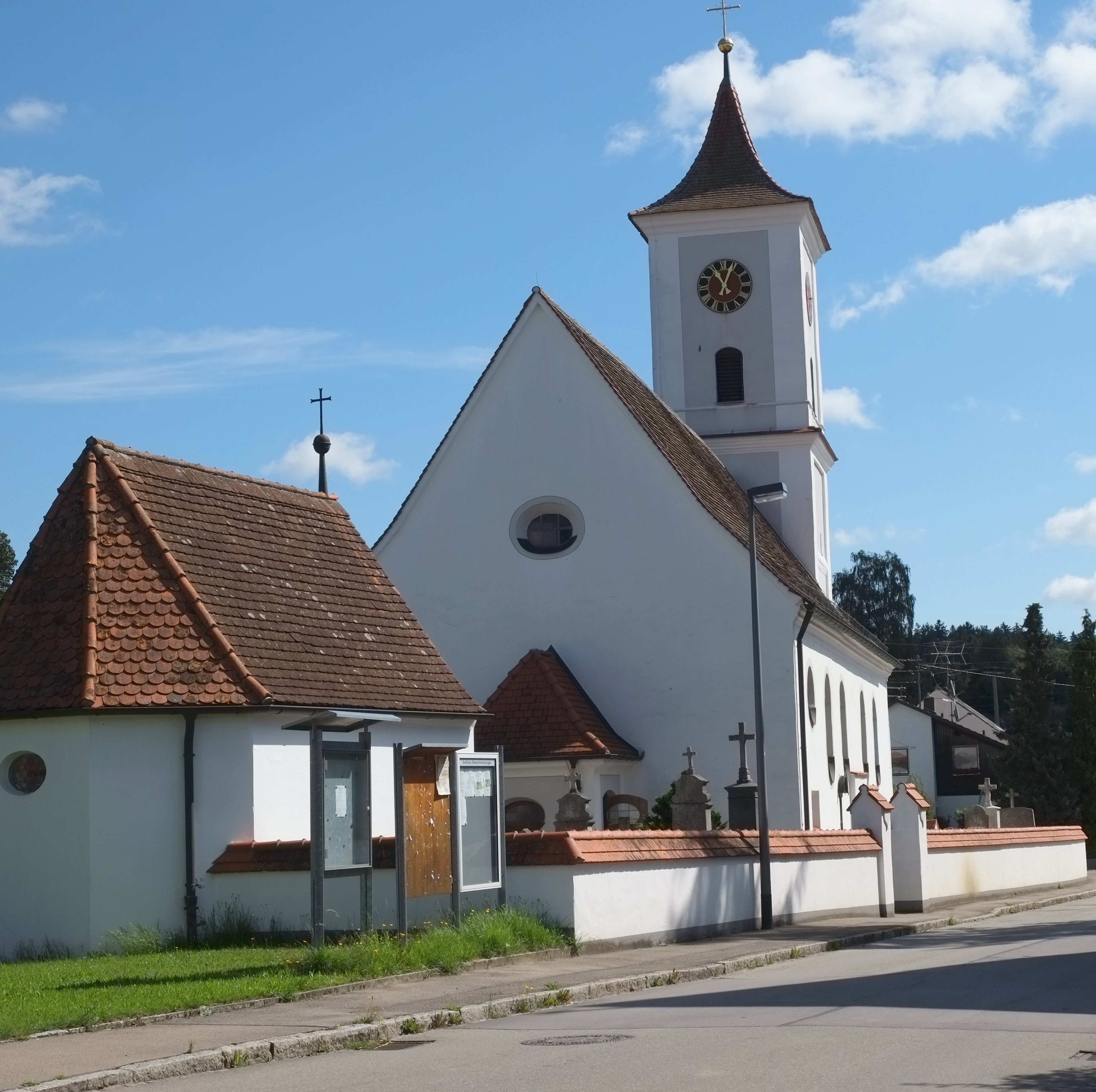 Kirche St. Stephan in Gallenbach, einem Stadtteil von Aichach im Landkreis Aichach-Friedberg (Bayern, Deutschland)